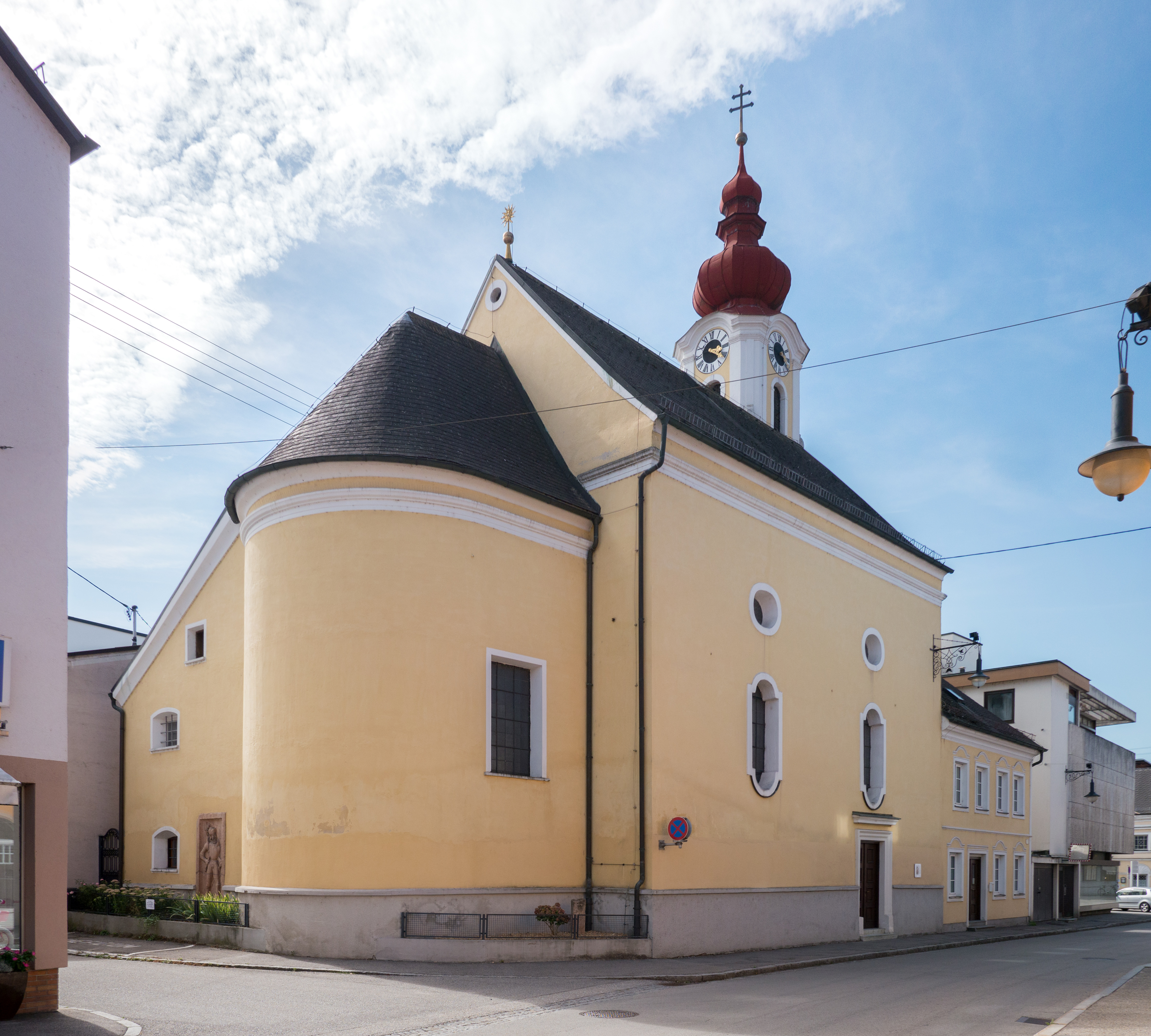 Kath. Filialkirche Marktkirche hl. Sebastian